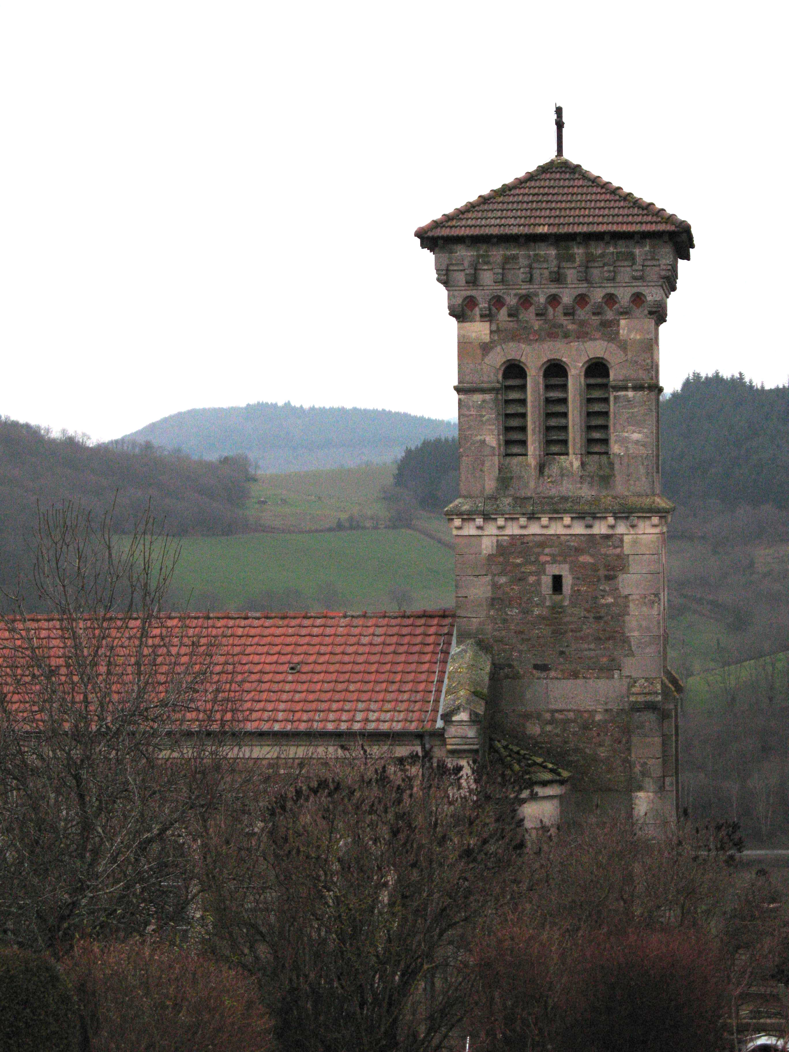 Le clocher de l'église de Cenves, dans le Rhône